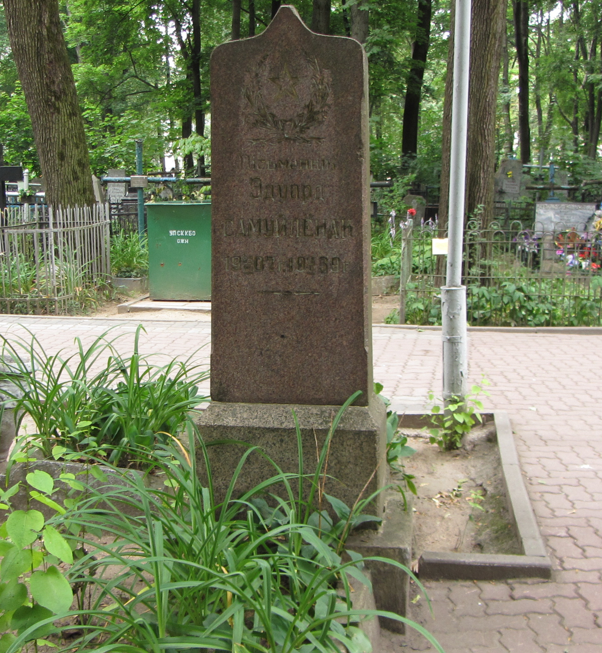 Беларуская (тарашкевіца): Помнік Эдуарду Самуйлёнку. Вайсковыя могілкі, Менск